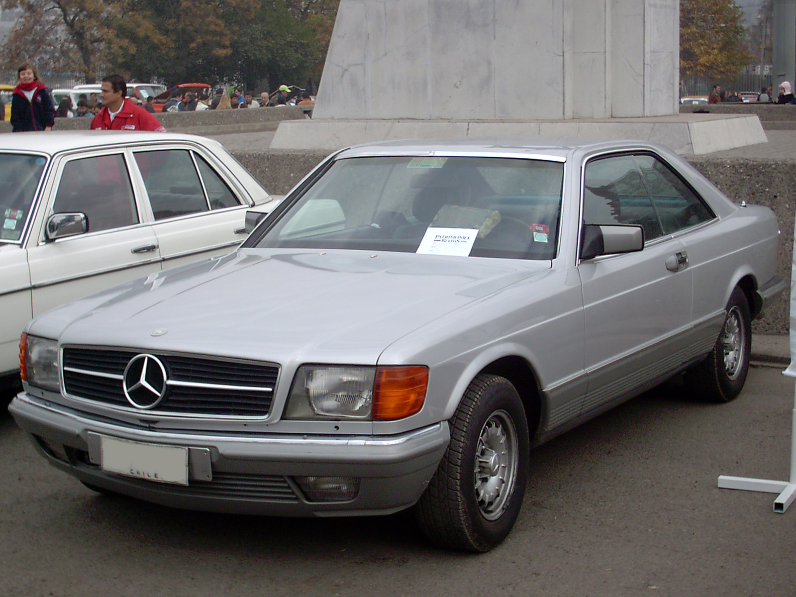 Mercedes Benz 500 SEC 1983